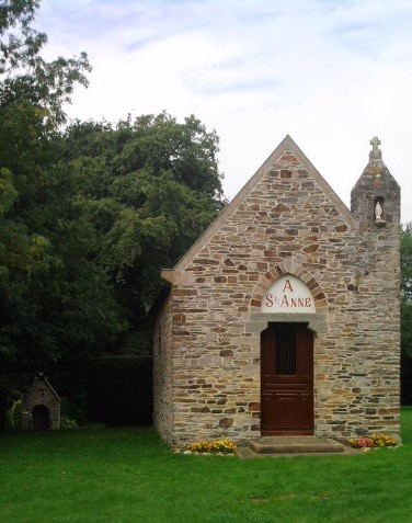 Chapelle Sainte Anne, commune de Sainte-Anne sur Vilaine (35390)